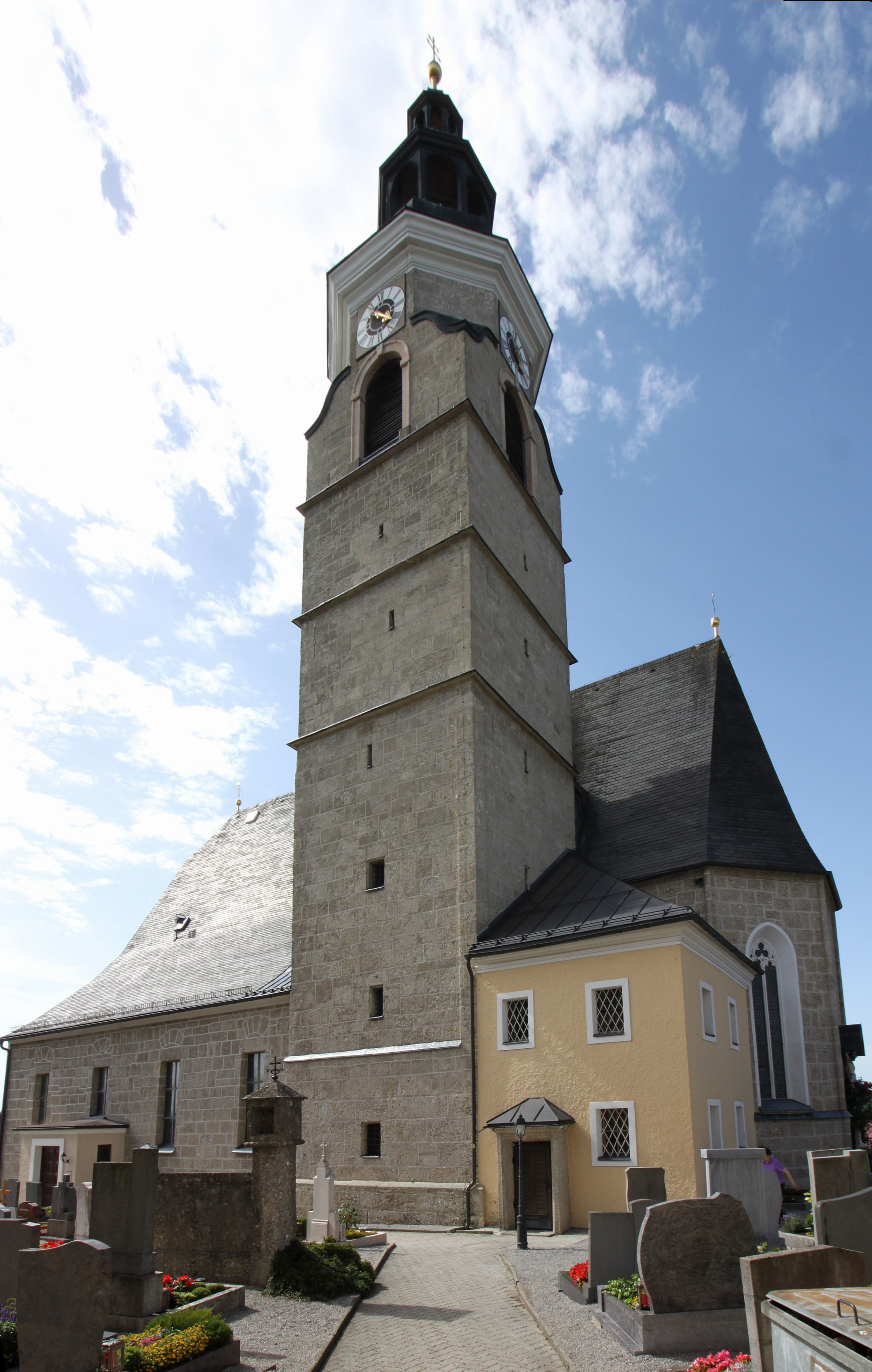 Kath. Pfarrkirche hl. Martin in Straßwalchen, von einem Friedhof umgeben, vom Durchgang im Pfarrhof aus